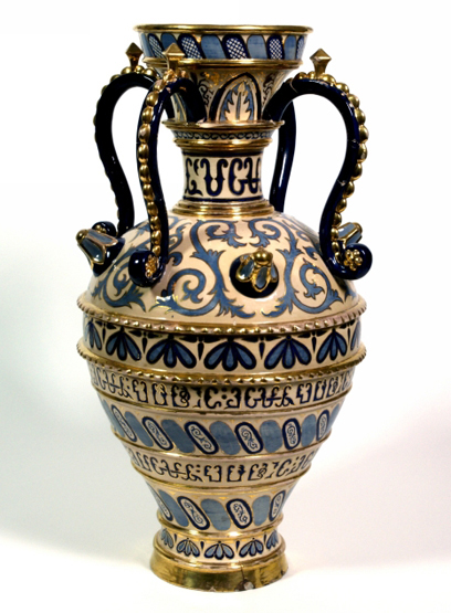 Vaso con decoro islamico. Pio Fabbri, Roma, seconda metà del XIX secolo.